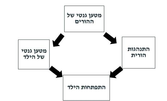 השפעת התנהגות ההורים והמטען הגנטי על התפתחות הילד